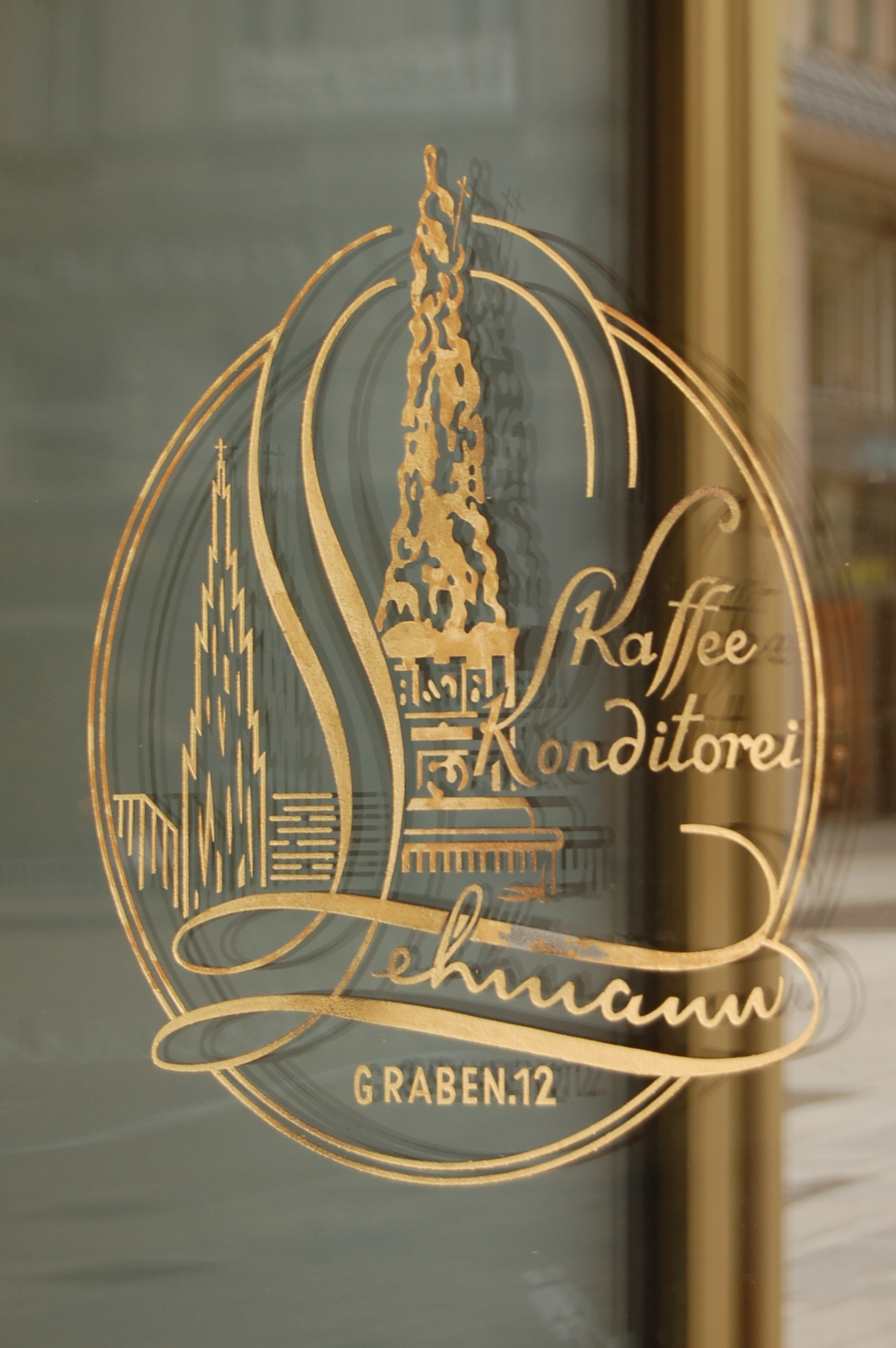 Konditorei Lehmann, Türlogo